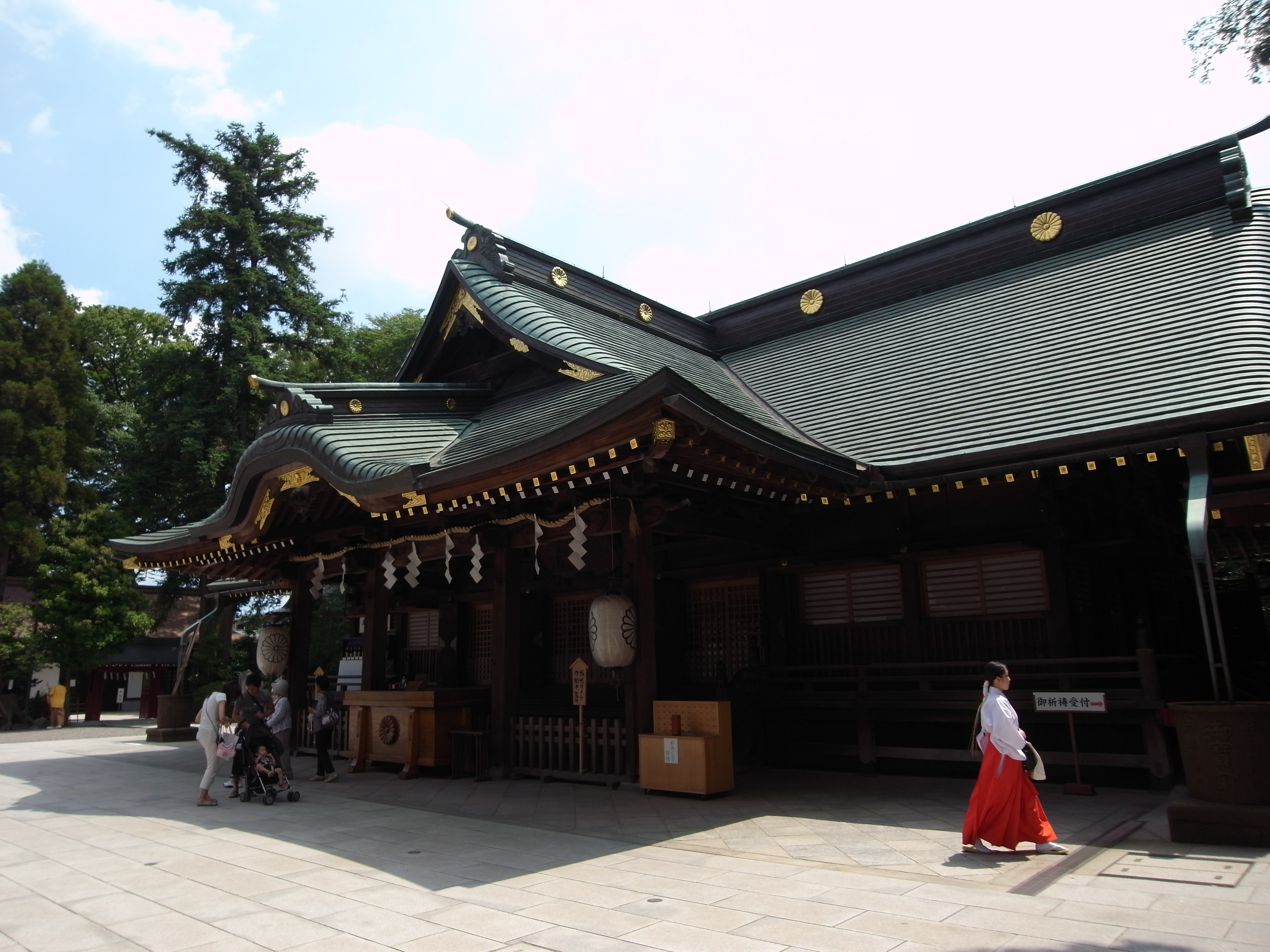 大國魂神社